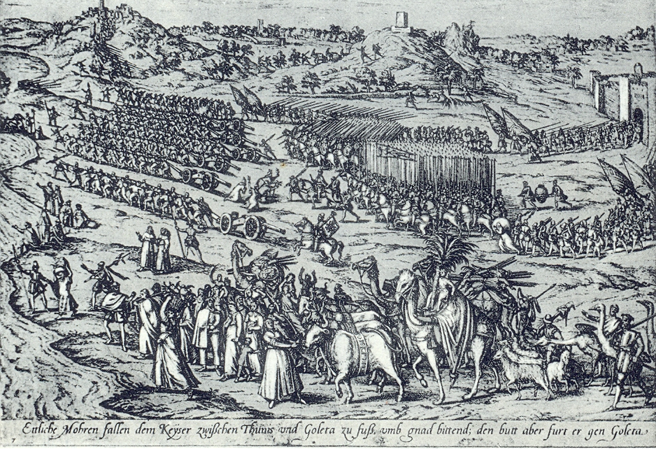 Charles Quint se rendant à Radès (illustration de Jan Cornelisz Vermeyen). Charles Quint sortant de Tunis à la tête de ses troupes pour se rendre à Radès.